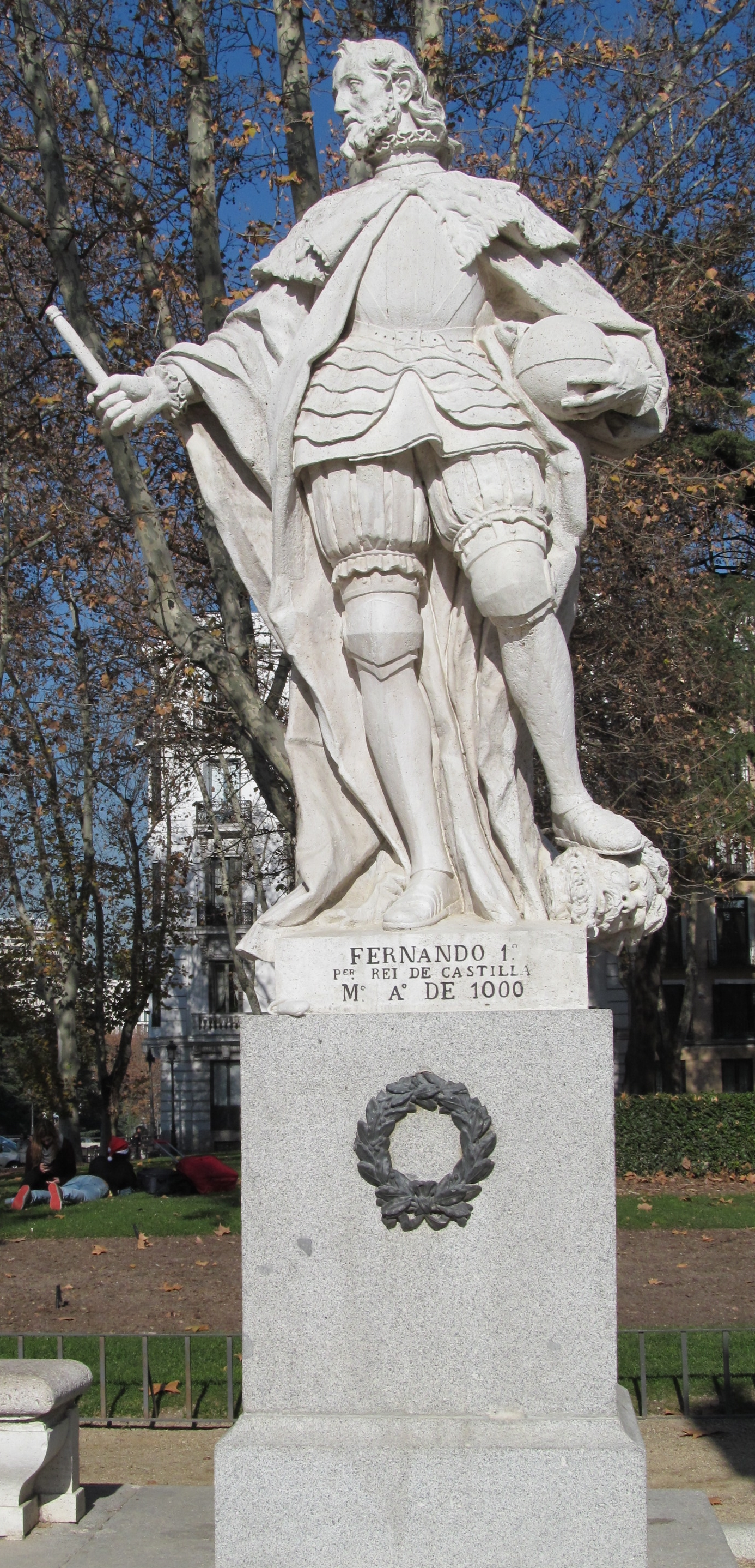 Fernando I, denominado el Magno, fue el primer rey de Castilla. Nació en 1016 hijo de Sancho III el Mayor, de Navarra, y de Da Nuña, hermana del conde castellano García Sánchez. A la muerte de su padre, en el año 1035, éste divide sus reinos entre sus cuatro hijos otorgando Navarra y Vascongadas a García, Castilla a Fernando, Ara-gón a Ramiro y Sobrarbe y Ribagorza a Gonzalo. Estátua en piedra blanca , en la Plaza de Oriente (Madrid)